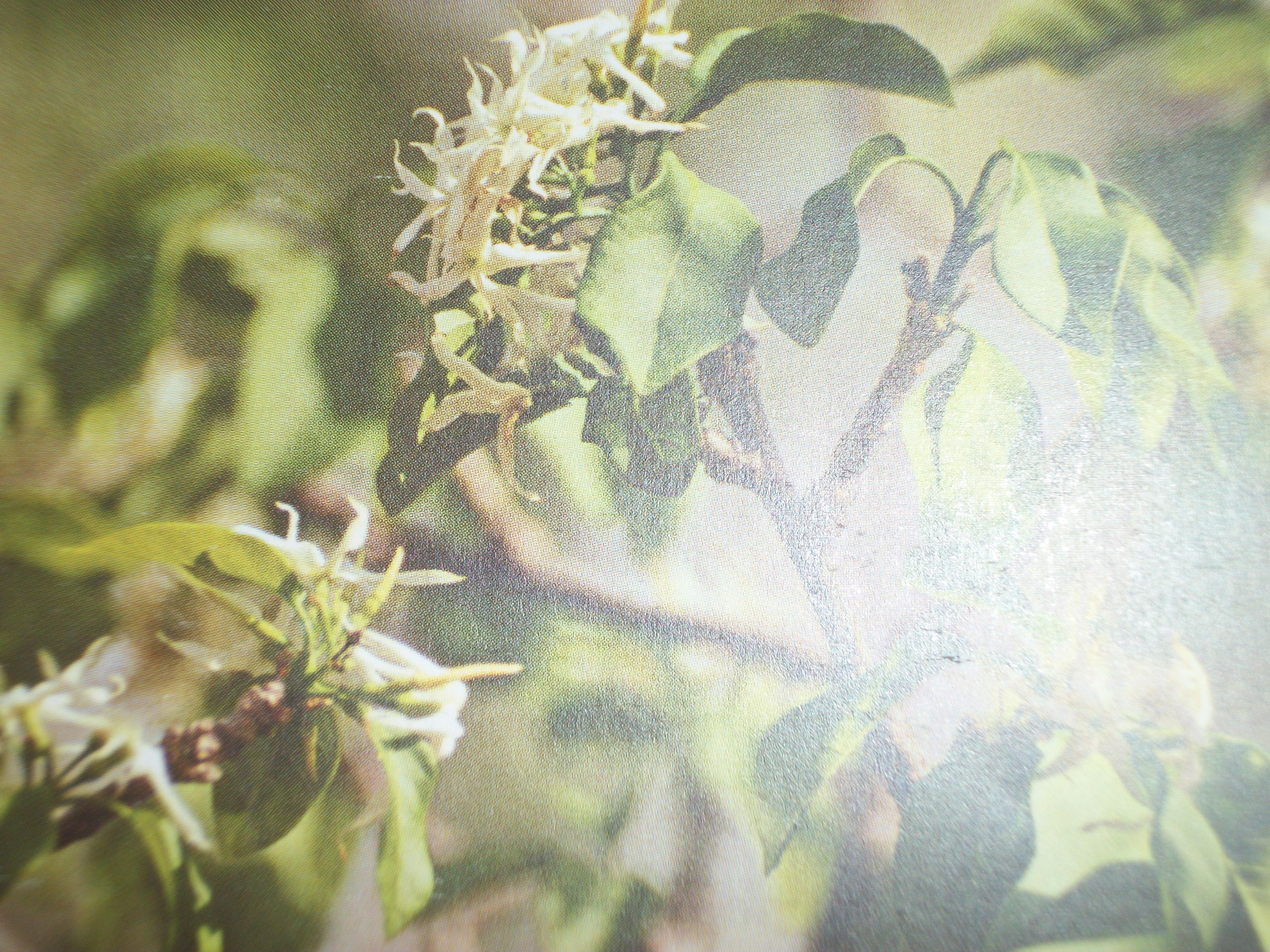 Aspidosperma pyrifolium, o pereiro, árvore da caatinga nordestina